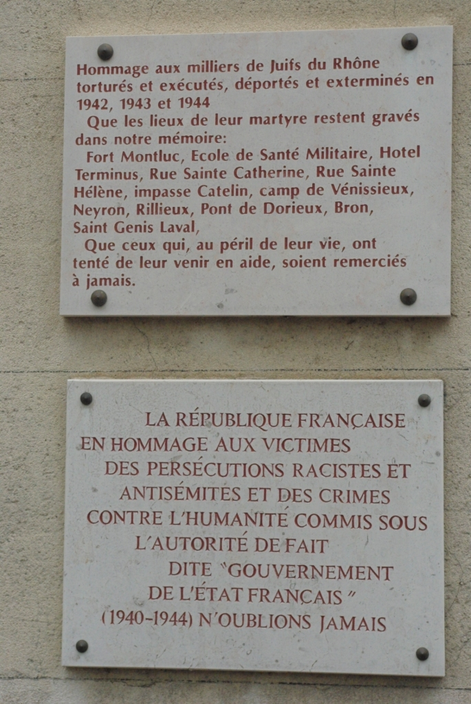 Centre d'Histoire de la Résistance et de la Déportation - Lyon - Commémoration des persécutions antijuives